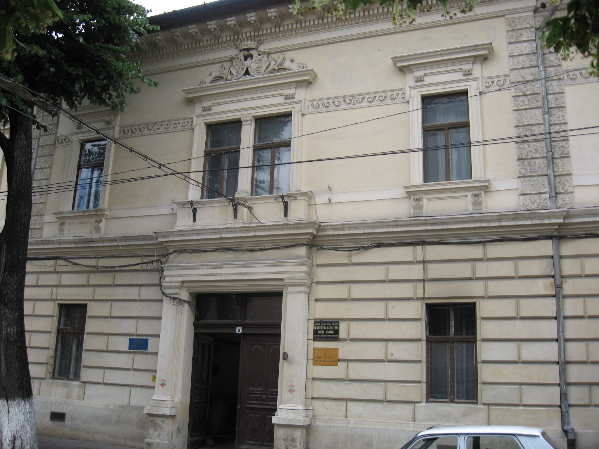 Cluj-Napoca, Casa Nemes-Bethlen, str. M.Kogălniceanu nr.8